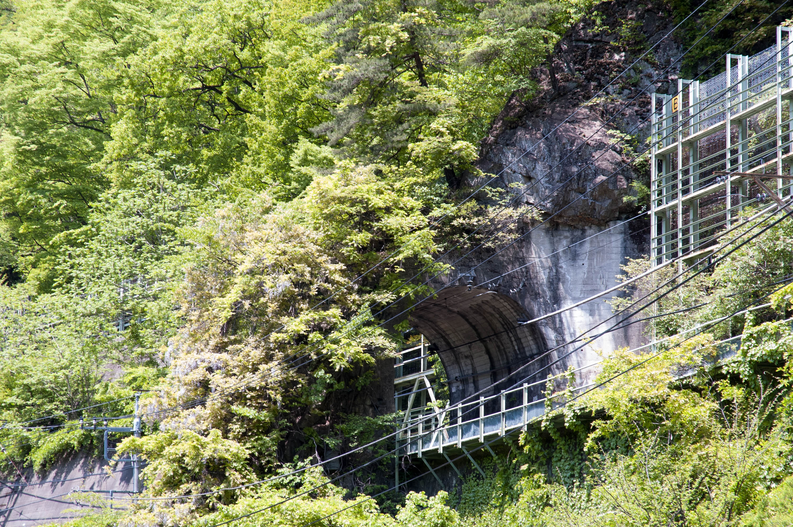 かつての樽沢隧道